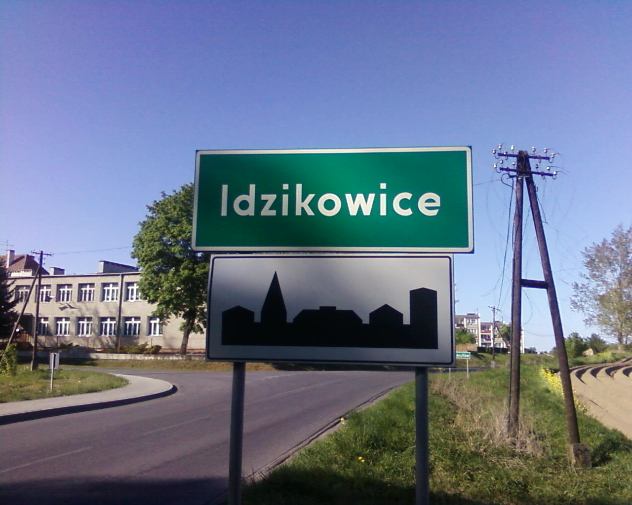 Znak Idzikowice.